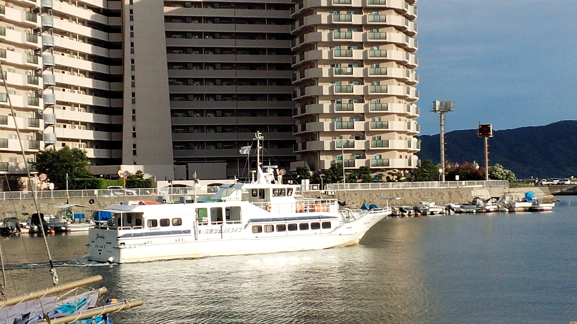 淡路ジェノバラインの小型船「ジェノバ１」